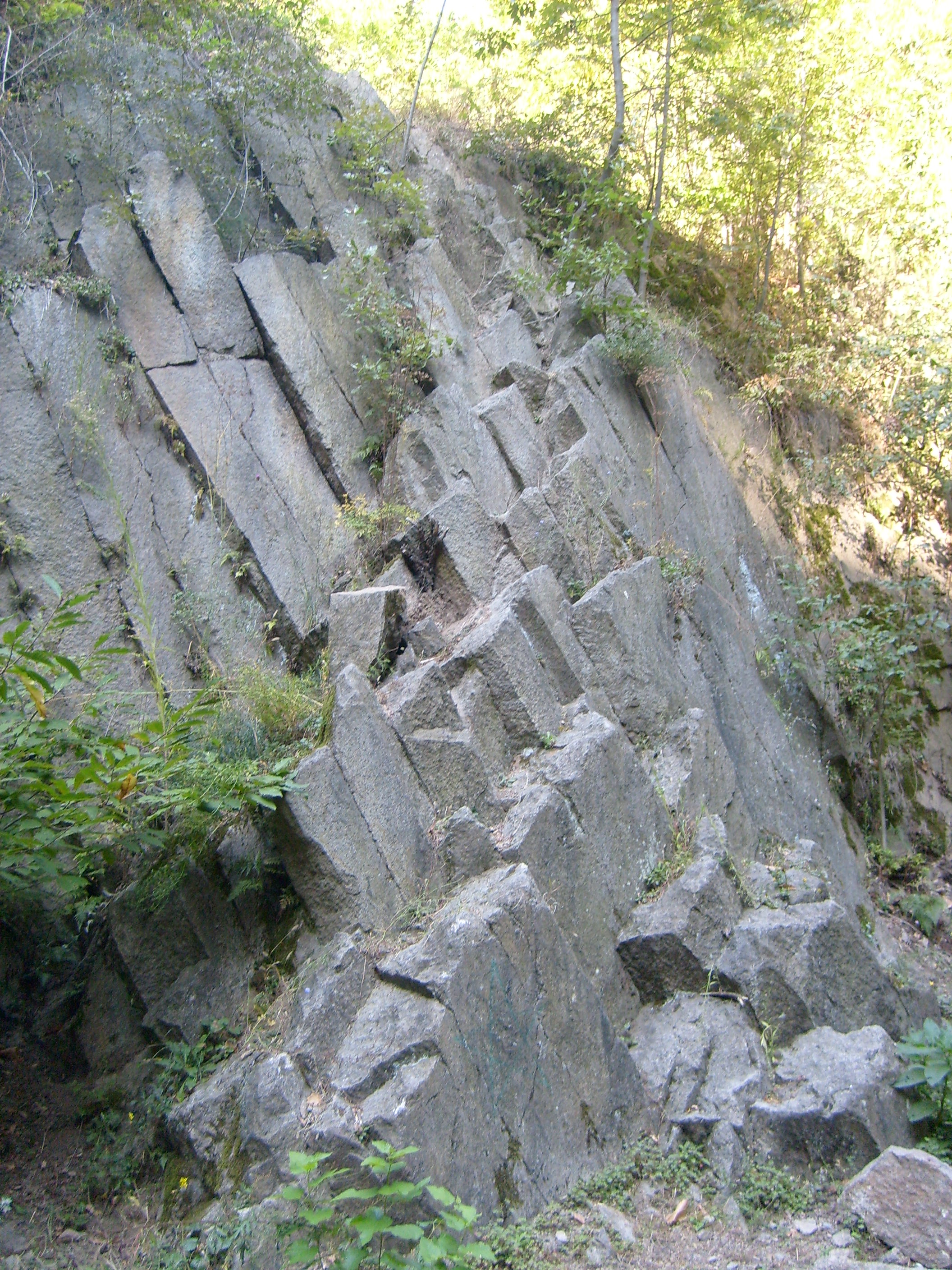 Porzione della cava di Riolite colonnare